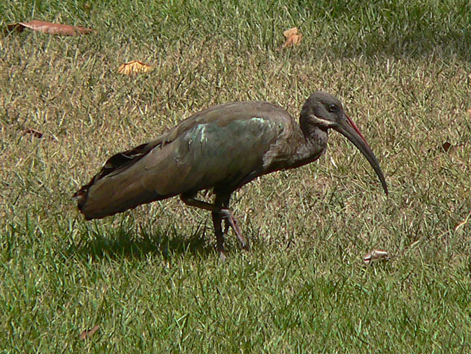 Hadada ibis photographed near Thika, Kenya.